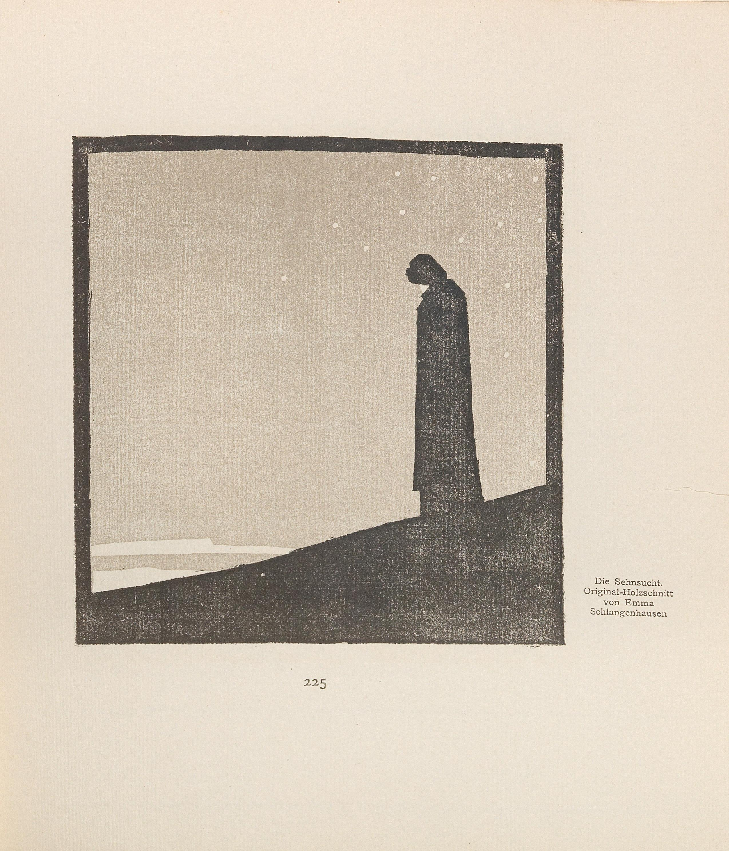 Emma Schlangenhausen: "Die Sehnsucht", aus: "Ver Sacrum. "Mitteilungen der Vereinigung Bildender Künstler Österreichs", 1903, Jahrgang VI, Heft 12, Heftformat 26 x 24,5 cm